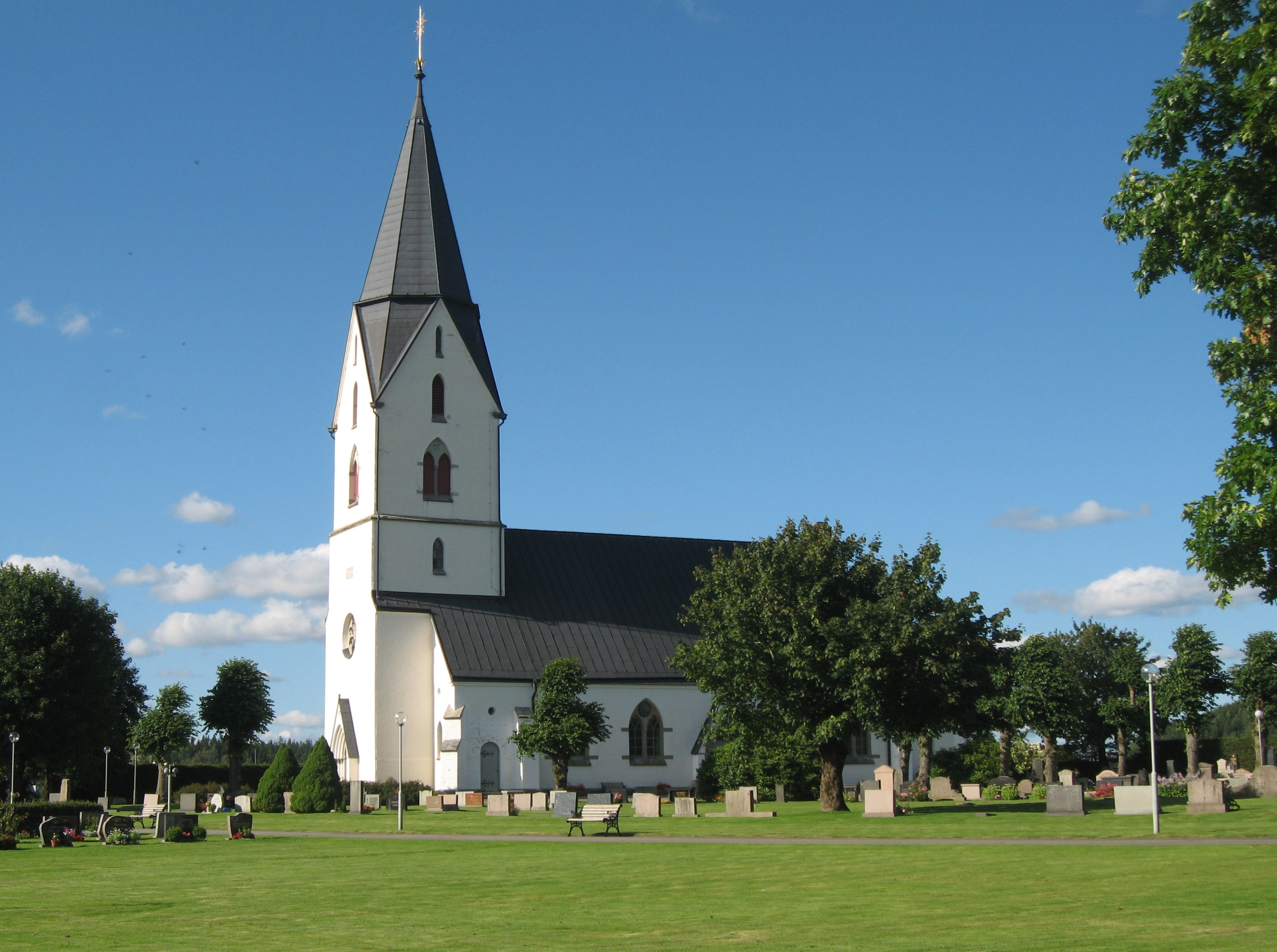 Hyssna kyrka (Hyssna 1:4) i Hyssna, Marks kommun.